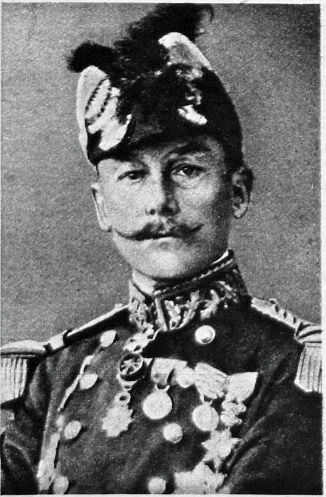 Le Miroir N°120 le général Humbert .